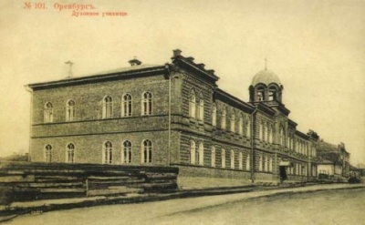 Здание Оренбургского духовного училища